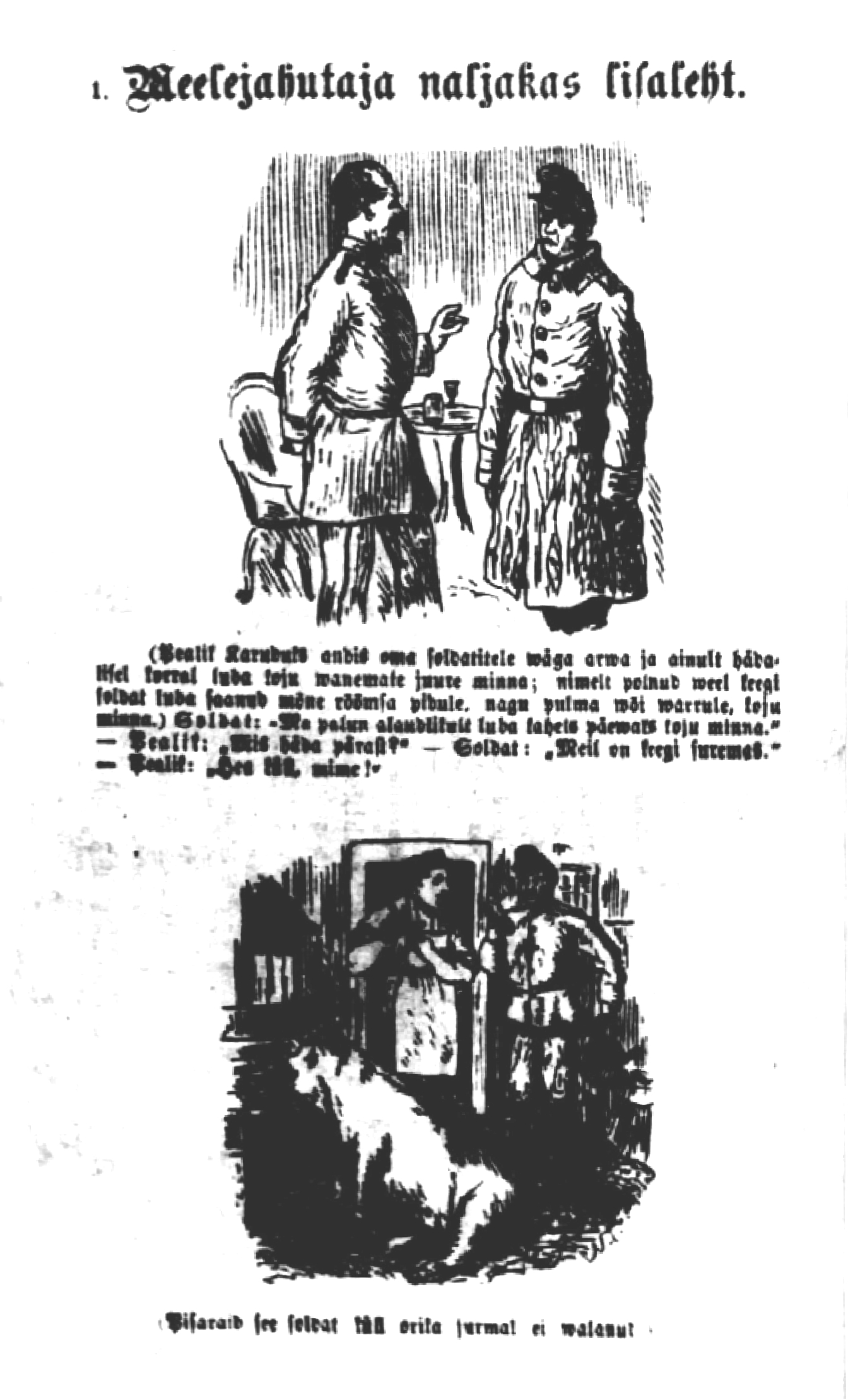 Meelejahutaja naljakas-lisaleht